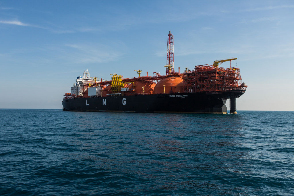 Il Terminale "FSRU Toscana"